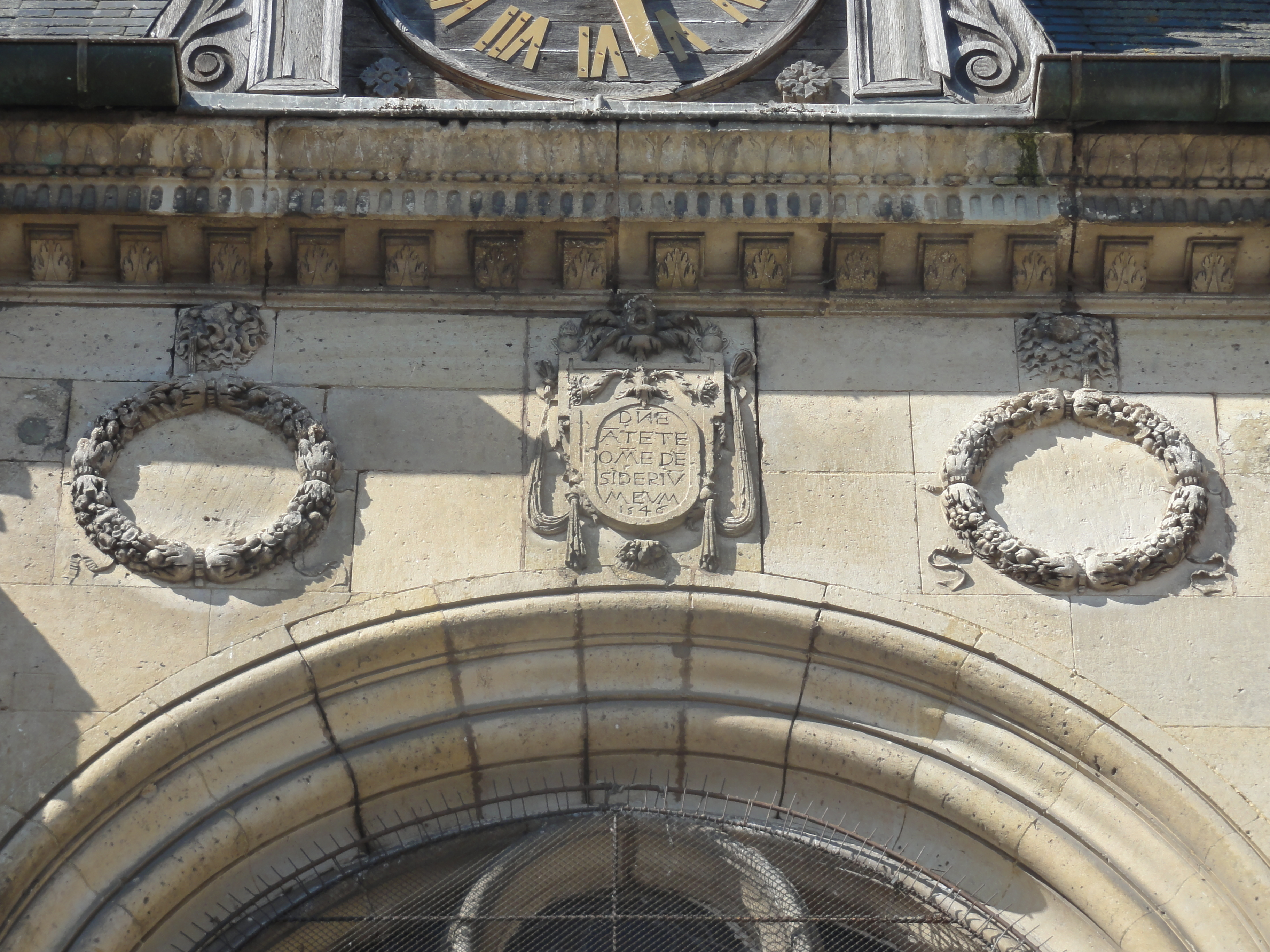 Chevet, parties hautes - inscription.